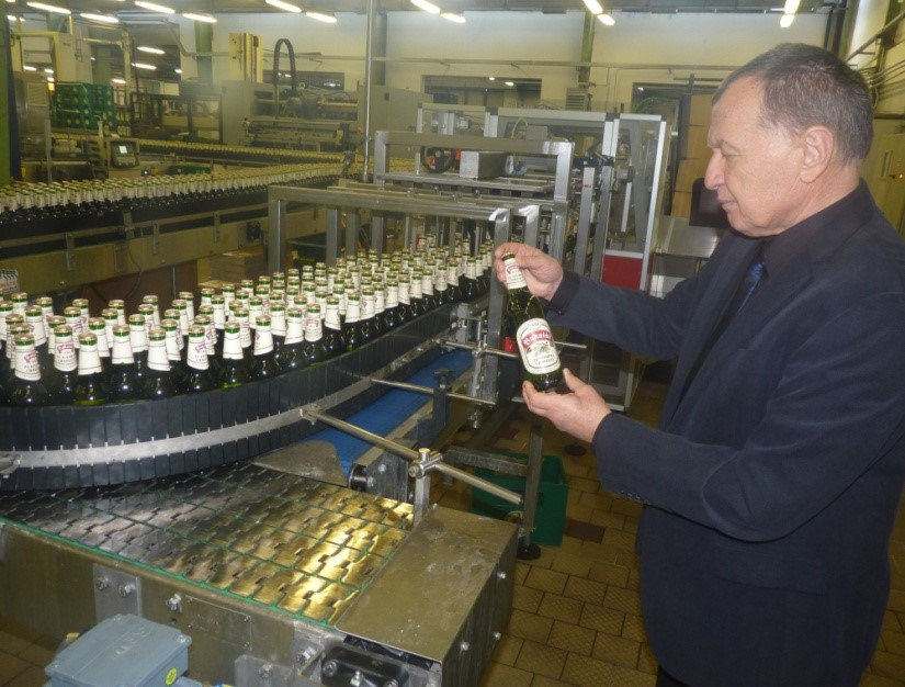 Ředitel Tradičního pivovaru Rakovník Ing. Pavel Gregorič u stáčecí linky